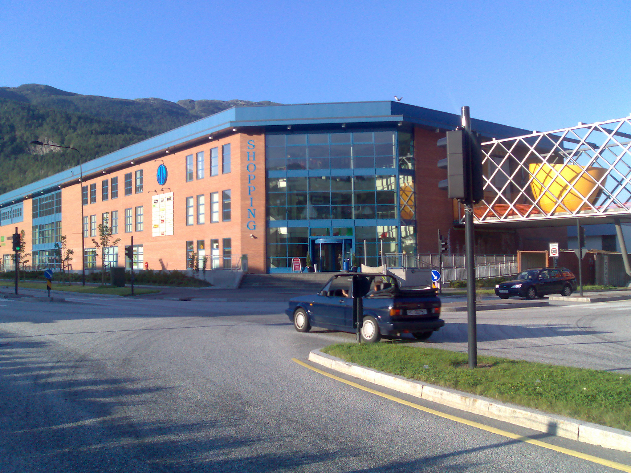 Handelshuset Nord.